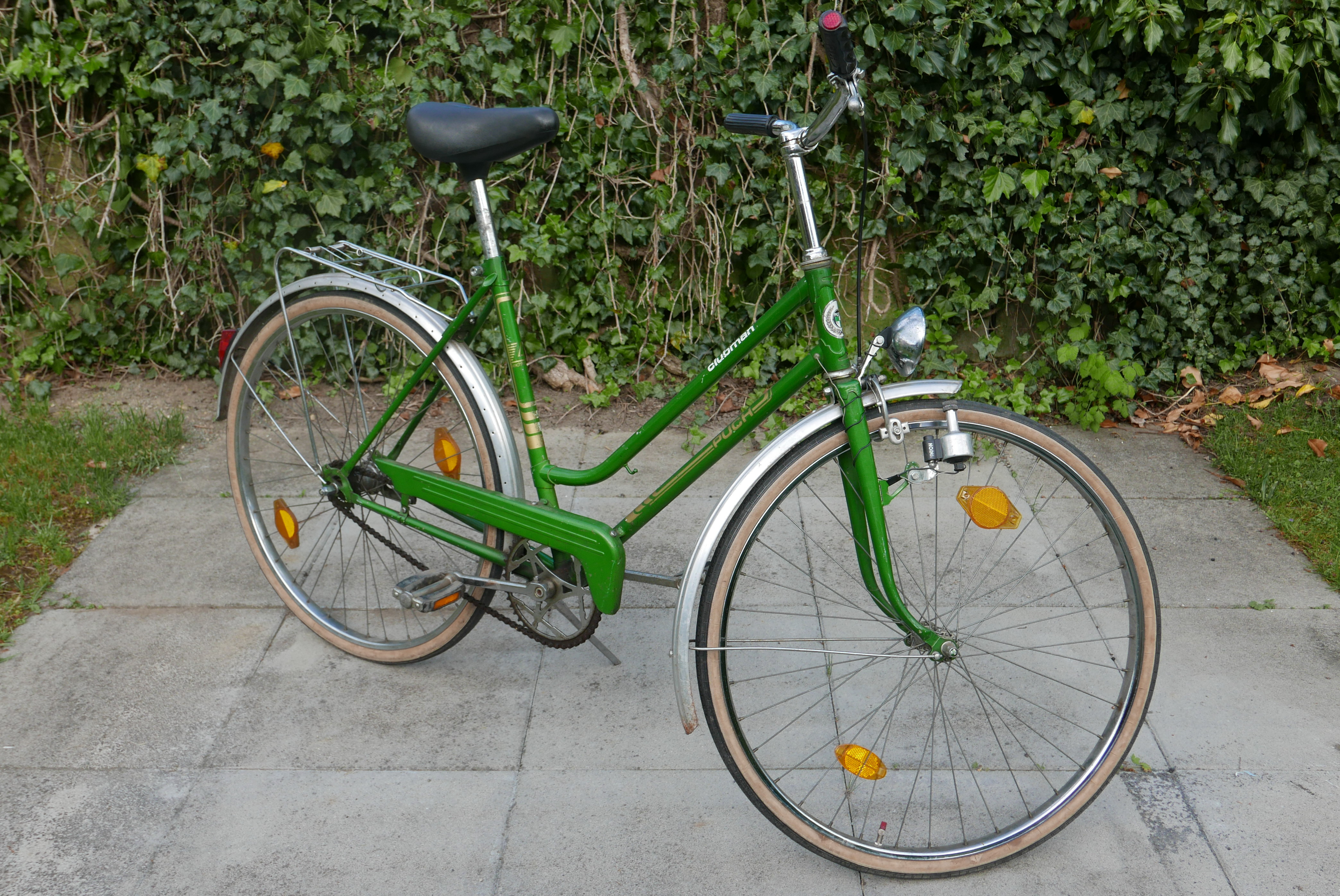 Puch Clubman Damenfahrrad grün